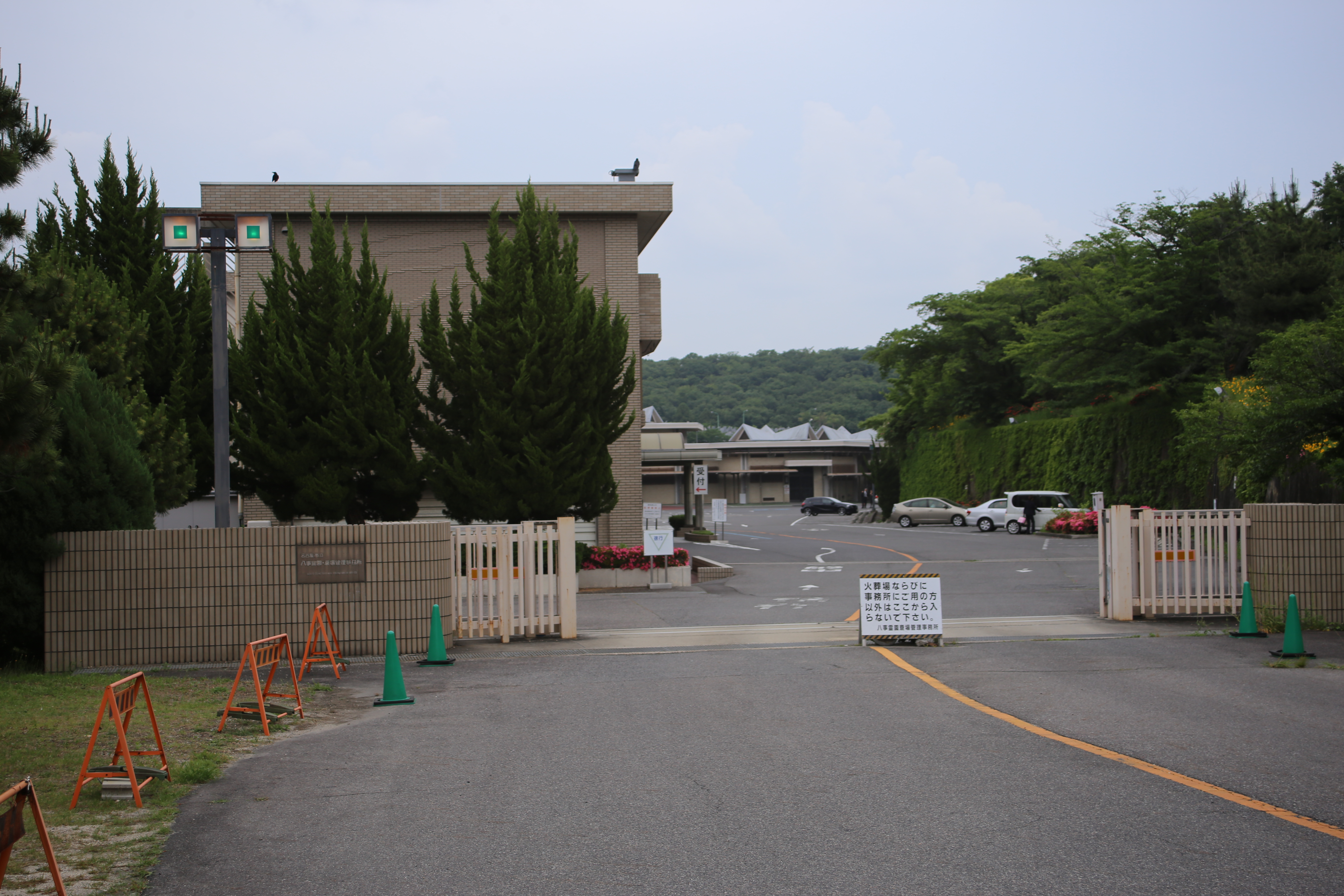 名古屋市昭和区・天白区の八事霊園内八事斎場入口を西側より撮影